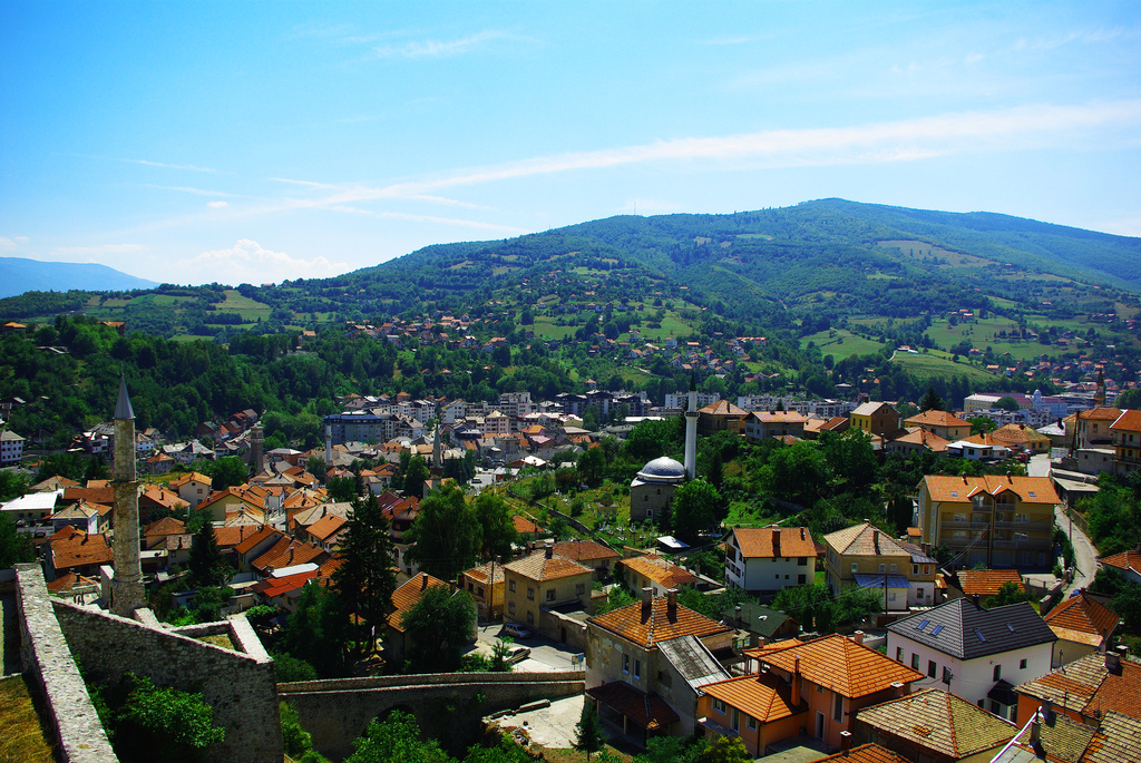 BiH 2012 - Travnik